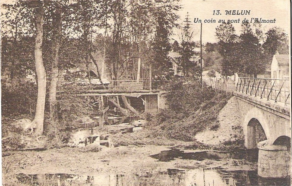 Almont et le pont éponyme à Melun au début du XXème siècle. Les rails du tramway sont légèrement visibles sur le pont ainsi que l'octroi de Bellevue au fond à droite.